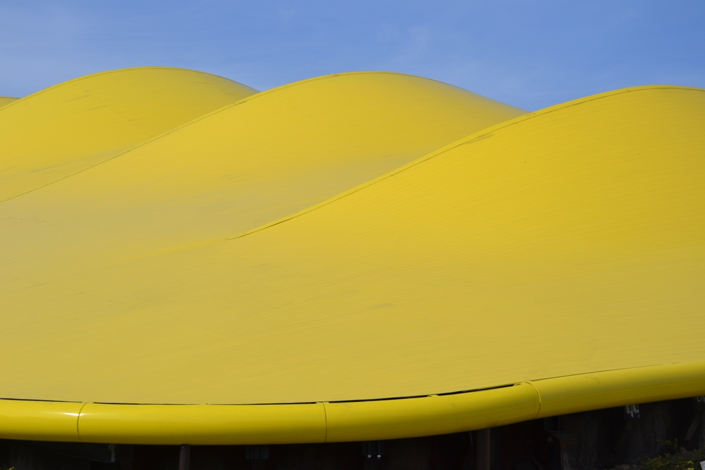 Museo Enzo Ferrari This is a photo of a monument which is part of cultural heritage of Italy.